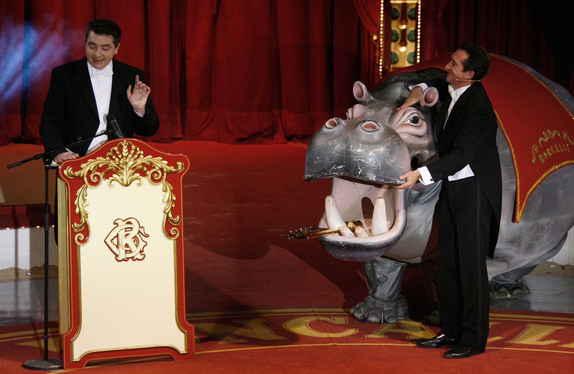 Verleihung des Nestroy-Theaterpreises 2009: Die Moderatoren Nicolaus Hagg und Christoph Wagner-Trenkwitz (Circus Roncalli auf dem Wiener Rathausplatz).